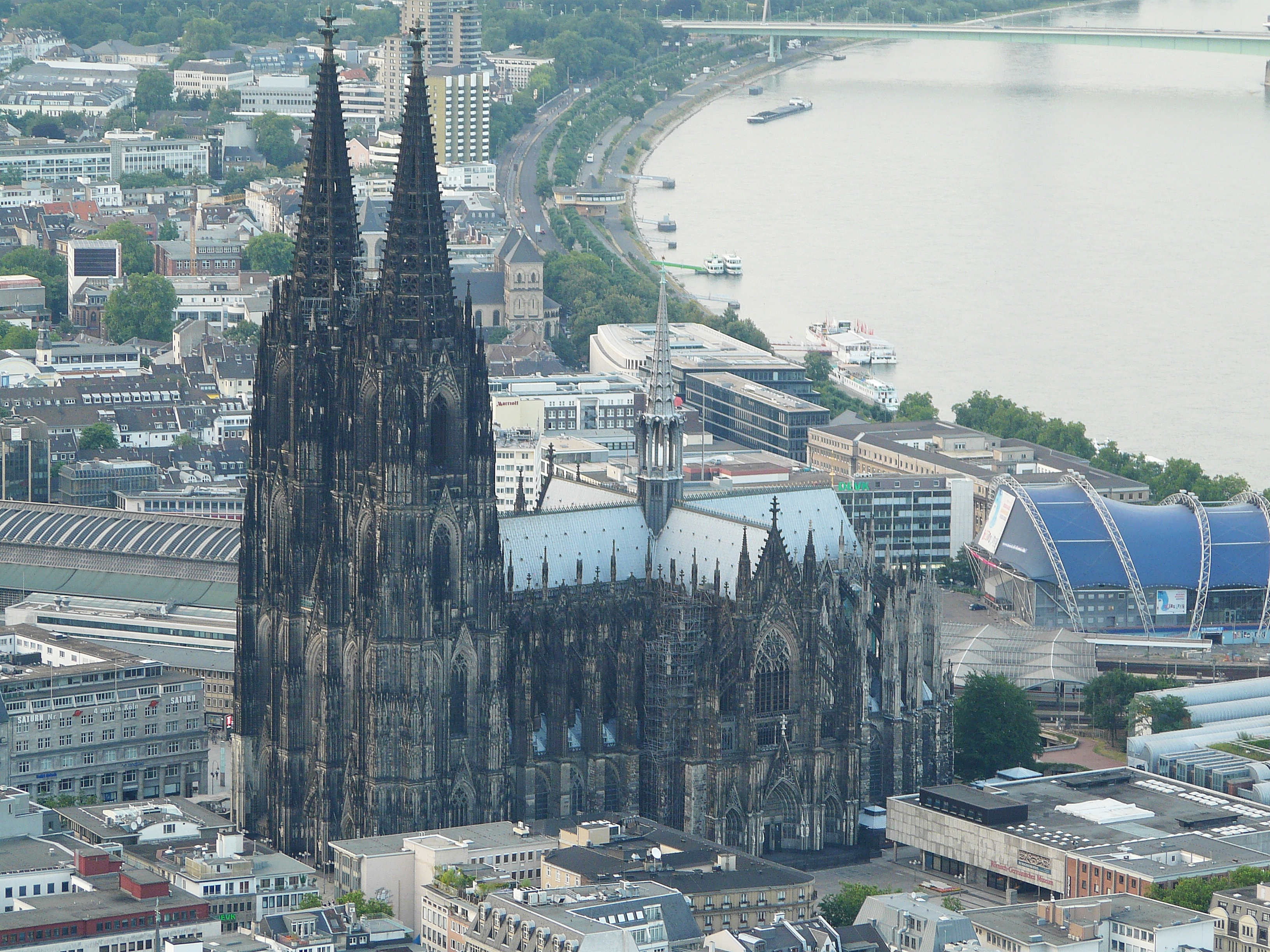 Südwestansicht des Kölner Doms